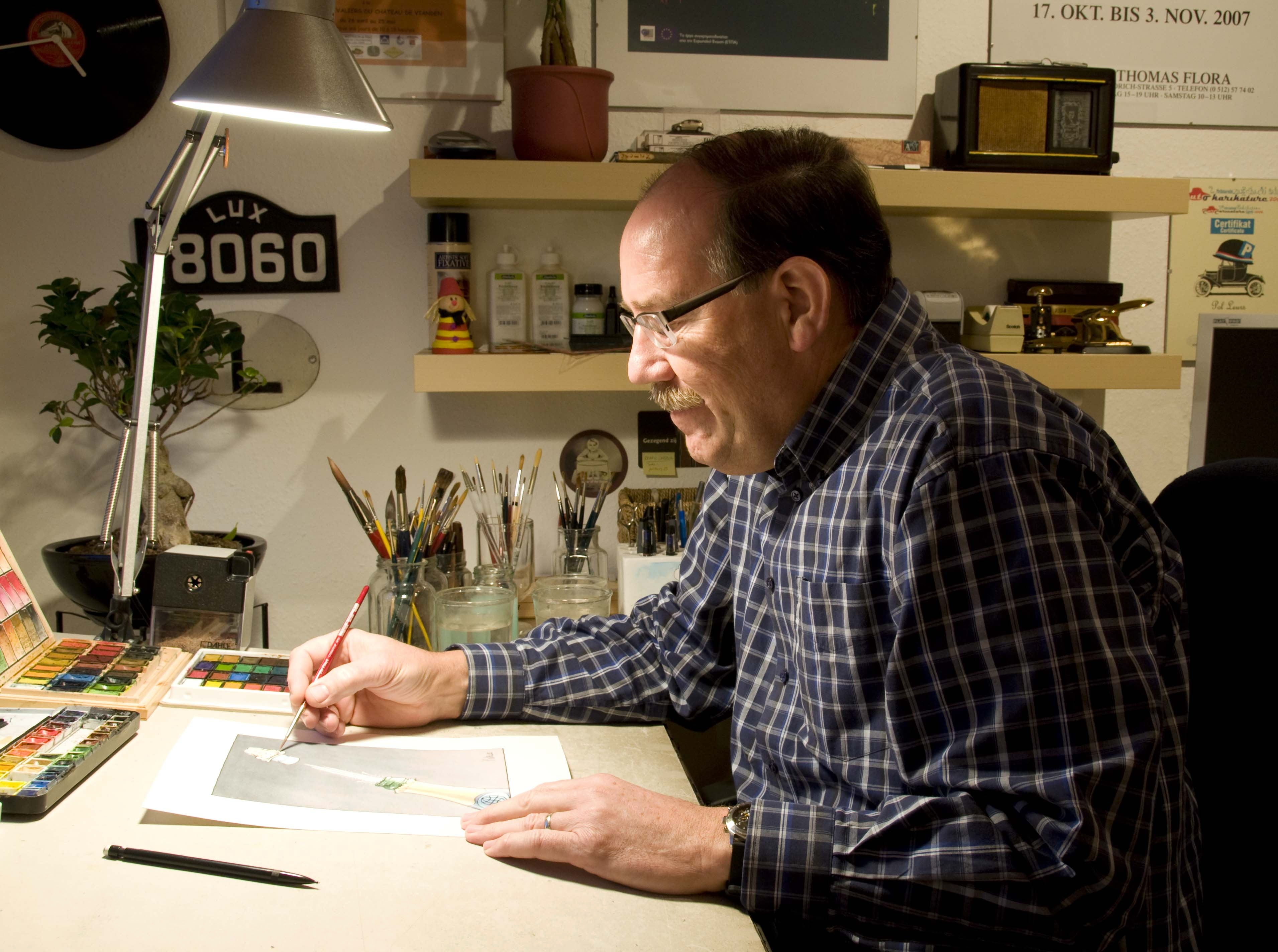 De Pol Leurs a sengem Atelier